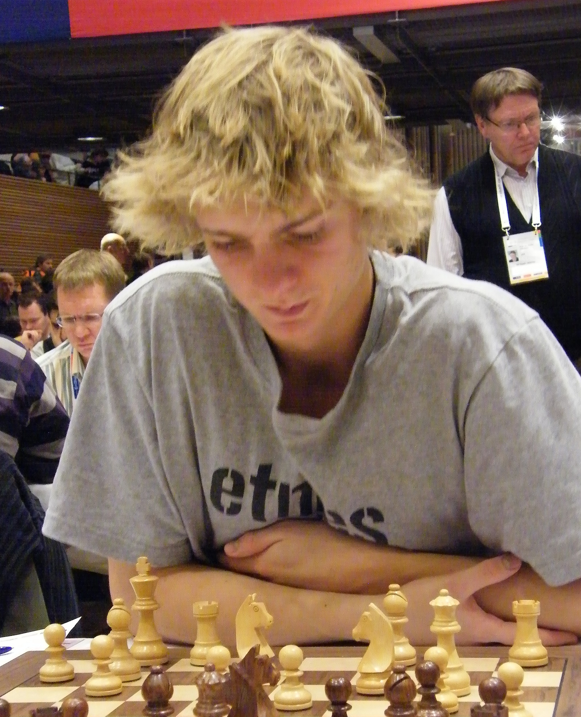 IM Jakob Vang Glut bei der Schacholympiade 2008 in Dresden